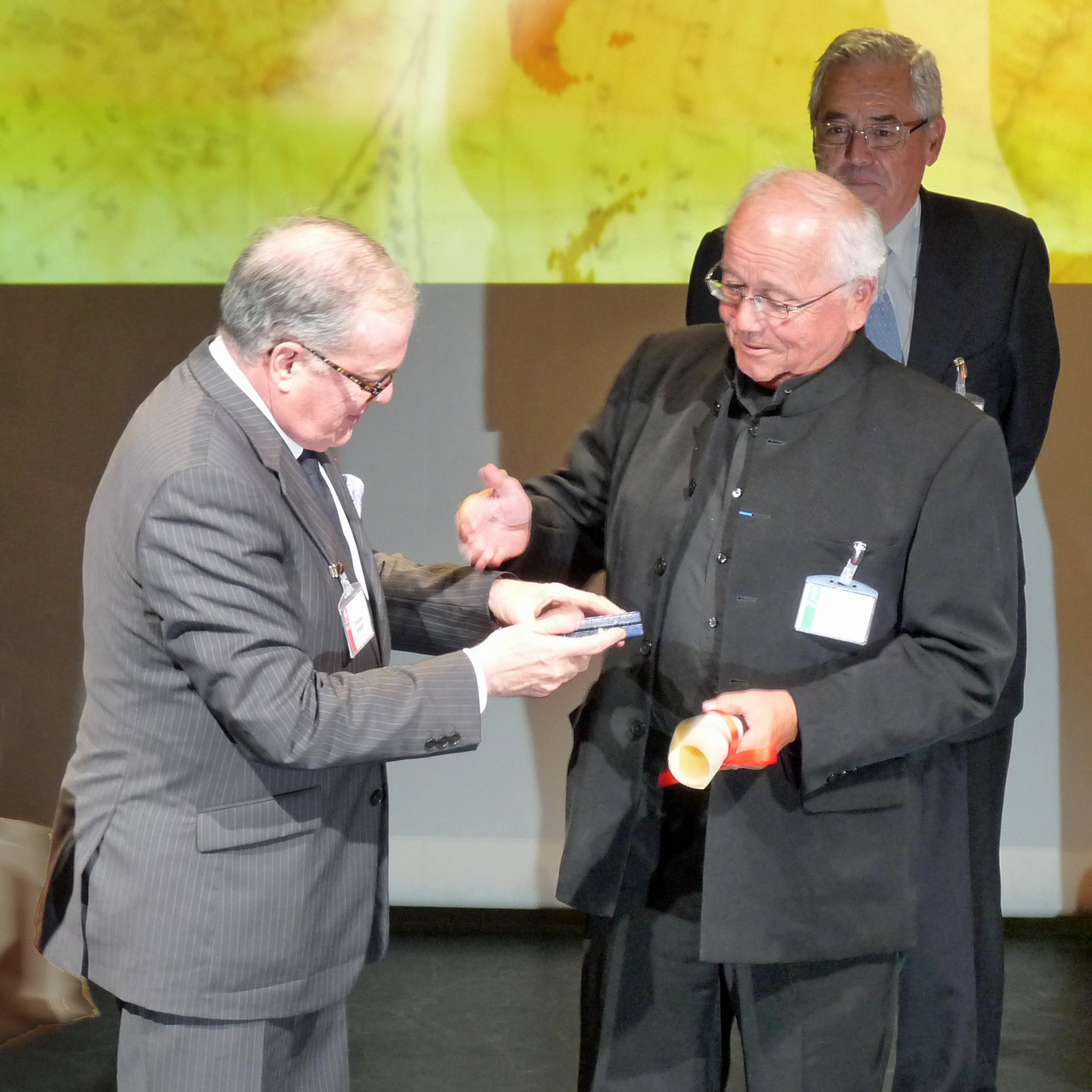 Antoine Bailly, lauréat du prix Vautrin Lud (Festival international de géographie de Saint-Dié-des-Vosges)